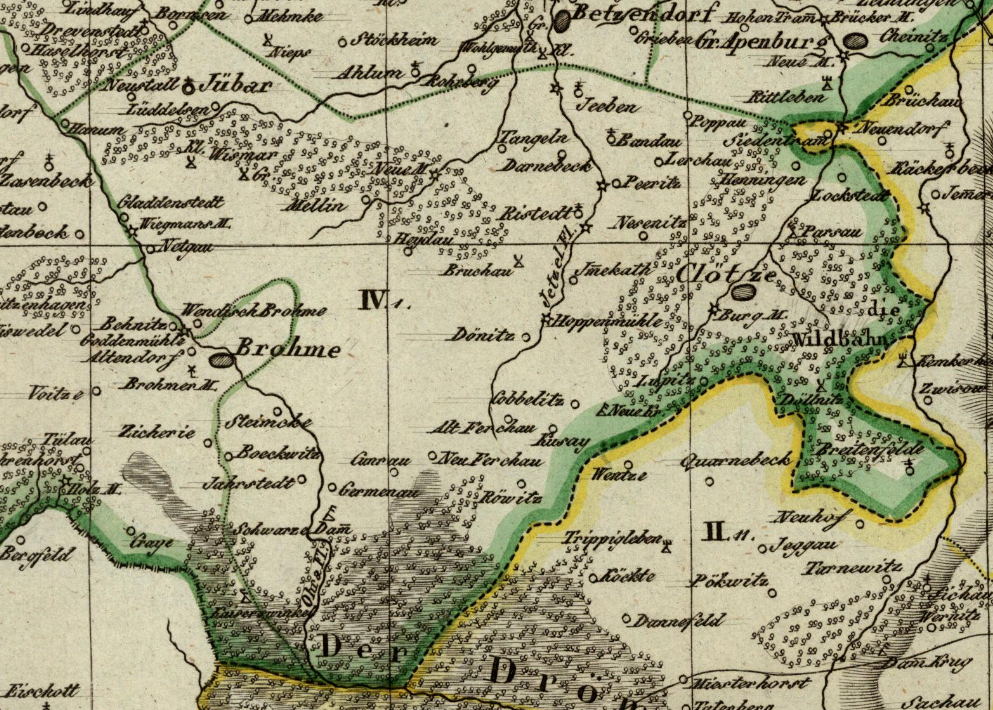 Der Kanton Jübar (1810-13) im Distrikt Salzwedel, Departement der Elbe, Königreich Westphalen